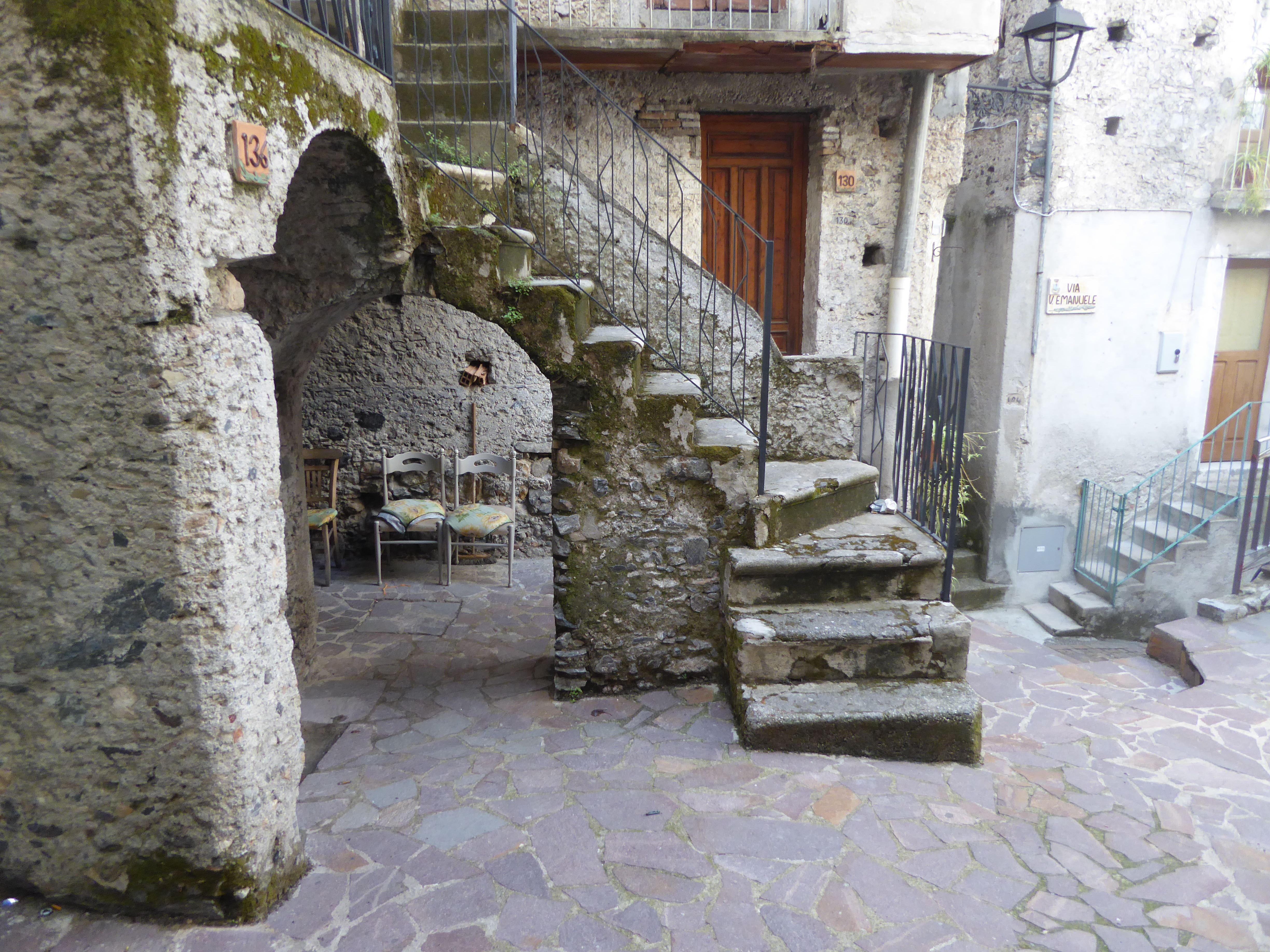 Ruga di Bivongi (2018)